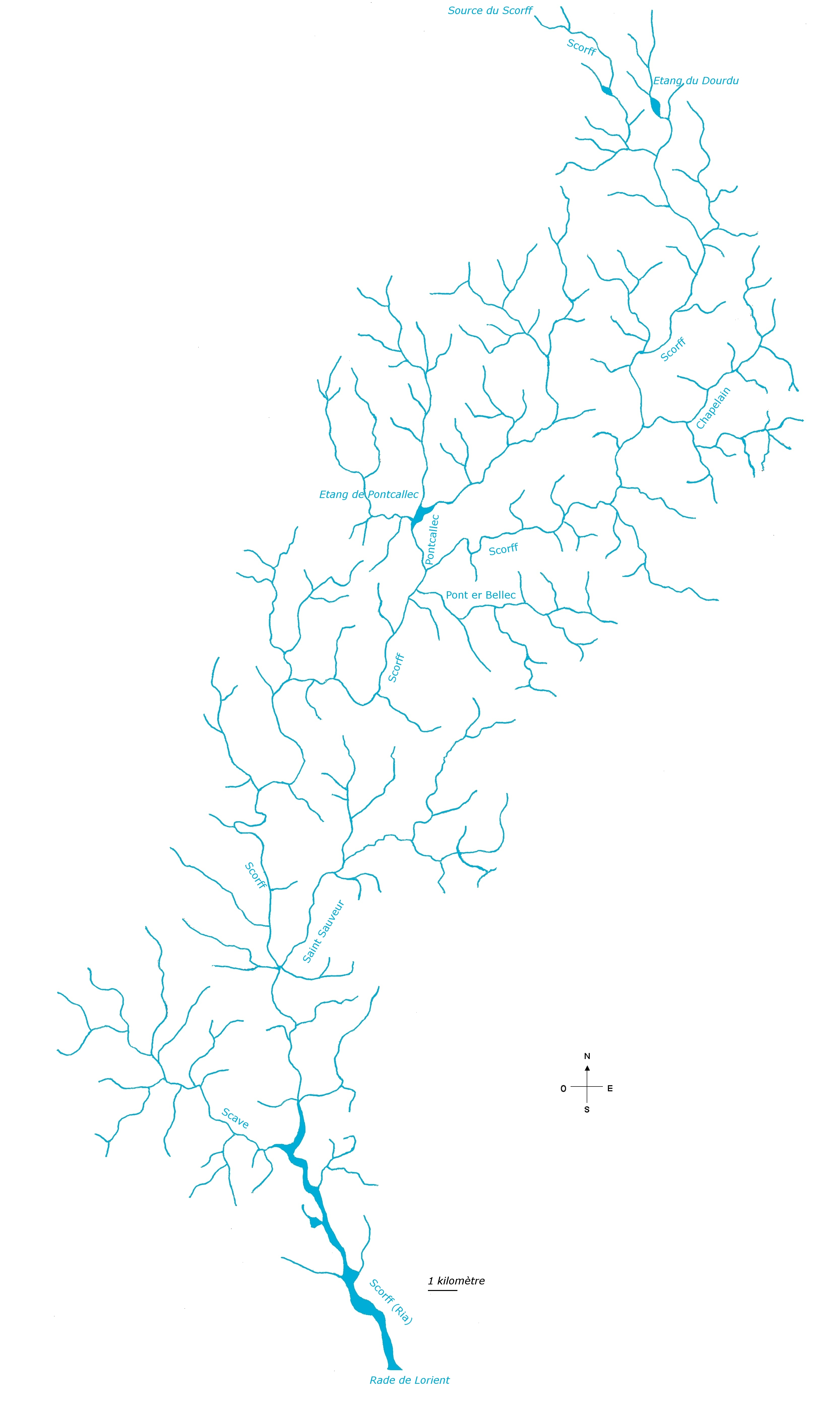 Carte représentant le cours du Scorff (fleuve côtier breton) et de ses affluents.